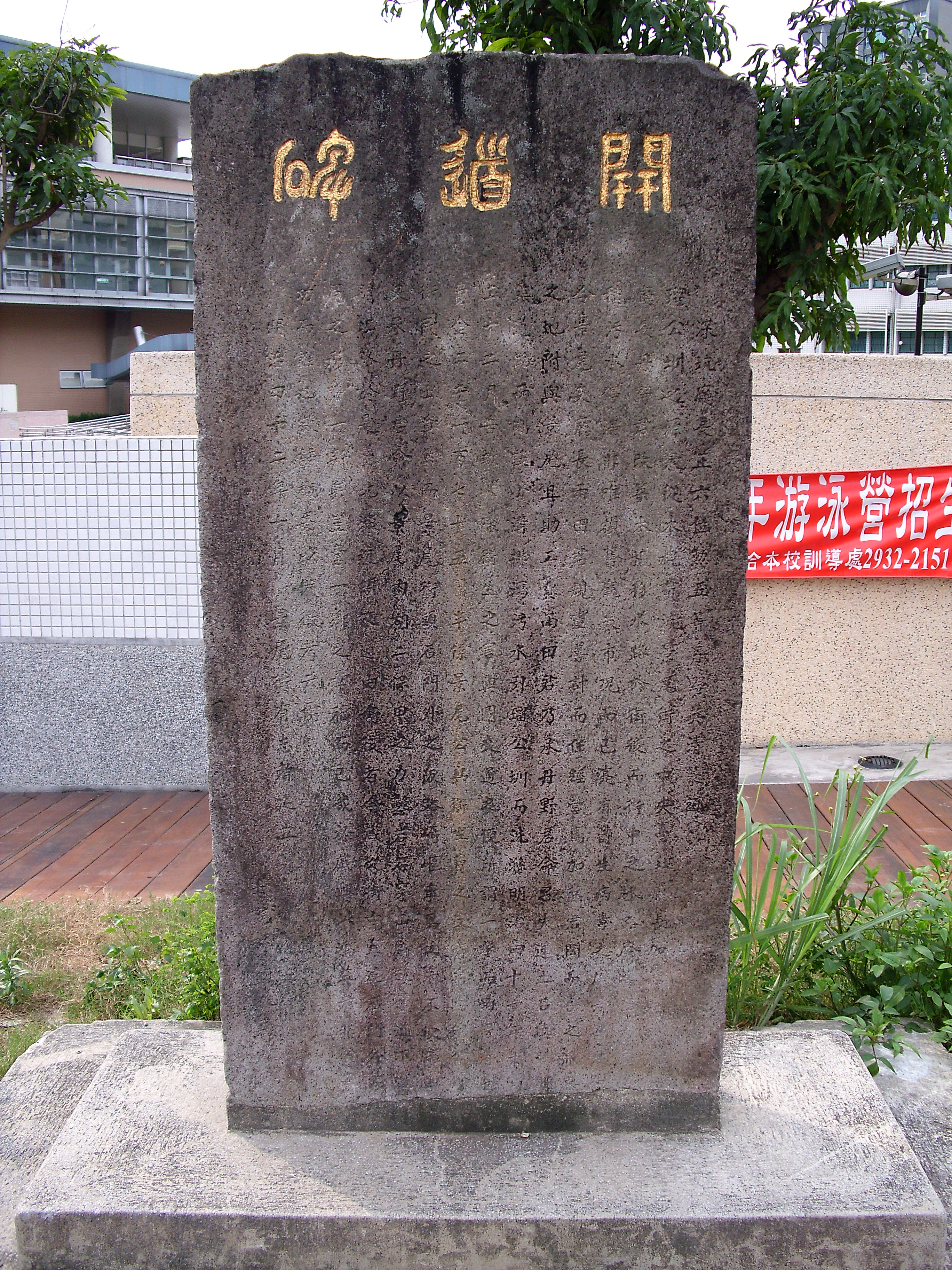 Bân-lâm-gú: 景尾街開道碑，佇臺北市文山區景美，正面佮後面攏有寫字，後面是芳名錄，碑文無點句。 深坑廳長正六位勳五等丹野英清篆額 瑠公圳之源泉從木梘貫流景尾街之中央，臺北廳長加藤君移文深坑廳長丹野英清君改築木梘，移水路於街後，而街中之水路廢為空溝，塵埃委積，污水停滯，非唯損市觀而已，實有鬱生病毒之虞。丹野君憂之，令景尾支廳長雨田君規畫善計而任經營焉。加藤君聞，喜之，將廢圳之地附與景尾，且助雨田君，乃承丹野君命，召夫運土石，填空溝而築道路，兩側設小溝排瀉污水，引瑠公圳洗滌。明治四十一年十月起工，十二月告竣，是除衛生之害與圖交道之便，所謂一舉而兩得者也，工費金二千一百七十五圓半，係景尾公共衛生費之丈辨，半為瑠公圳與街民之出資，然而景尾街頭石門外之坂路崎嶇，車馬往來不便，雨田君又承丹野君命，以景尾、內湖二區保甲之力，鑿岩石穿山腳，就舊道下邊更開坦路，於是臺北、深坑頓交通由街後者，今咸從街中宜達石川外，而景尾之形勢一新矣！豈啻一鄉之幸福而已哉！於戲！興此鴻益者，非賢宰立功而誰也？敬誌概要以備徵考之爾！ 明治四十二年九月 景尾街有志者建之 壬寅科舉人高選鋒書